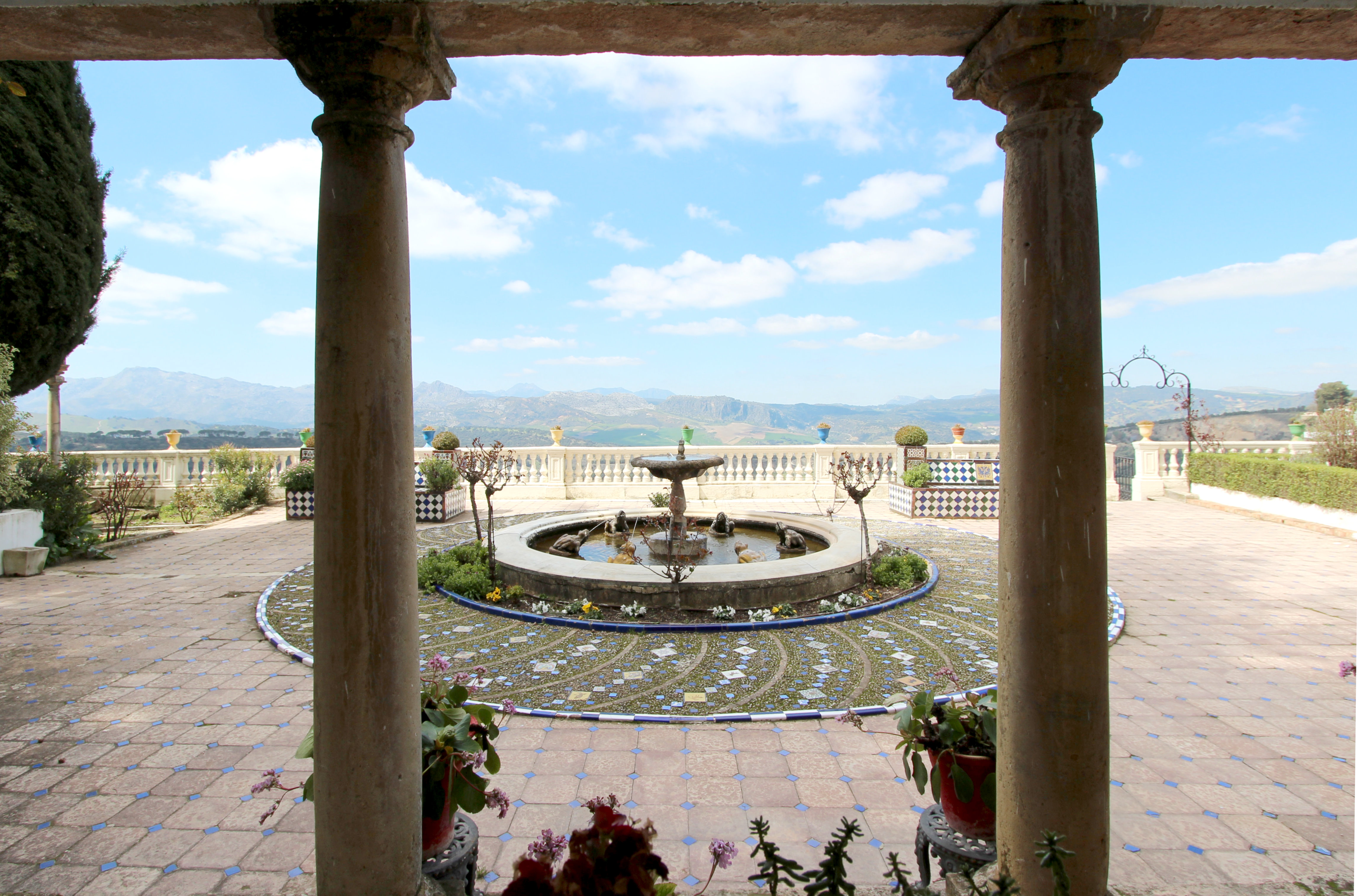 Dieser modernistische Palast wurde Anfang des 20. Jahrhunderts gebaut. Das Gebäude liegt am Schluchtfelsen im Zentrum des historischen Stadtviertels von Ronda. Es gehörte der Familie Granadinos, die es als Erbe dem Salesianerorden überlassen hatte, um als Krankenhaus für kranke und alte Ordenspriester zu dienen. Die Gärten sind wegen ihrer Lage sehr interessant; sie befinden sich auf einem natürlichen Balkon des Gebirgslandes. (Quelle: Aufnahme von 2018